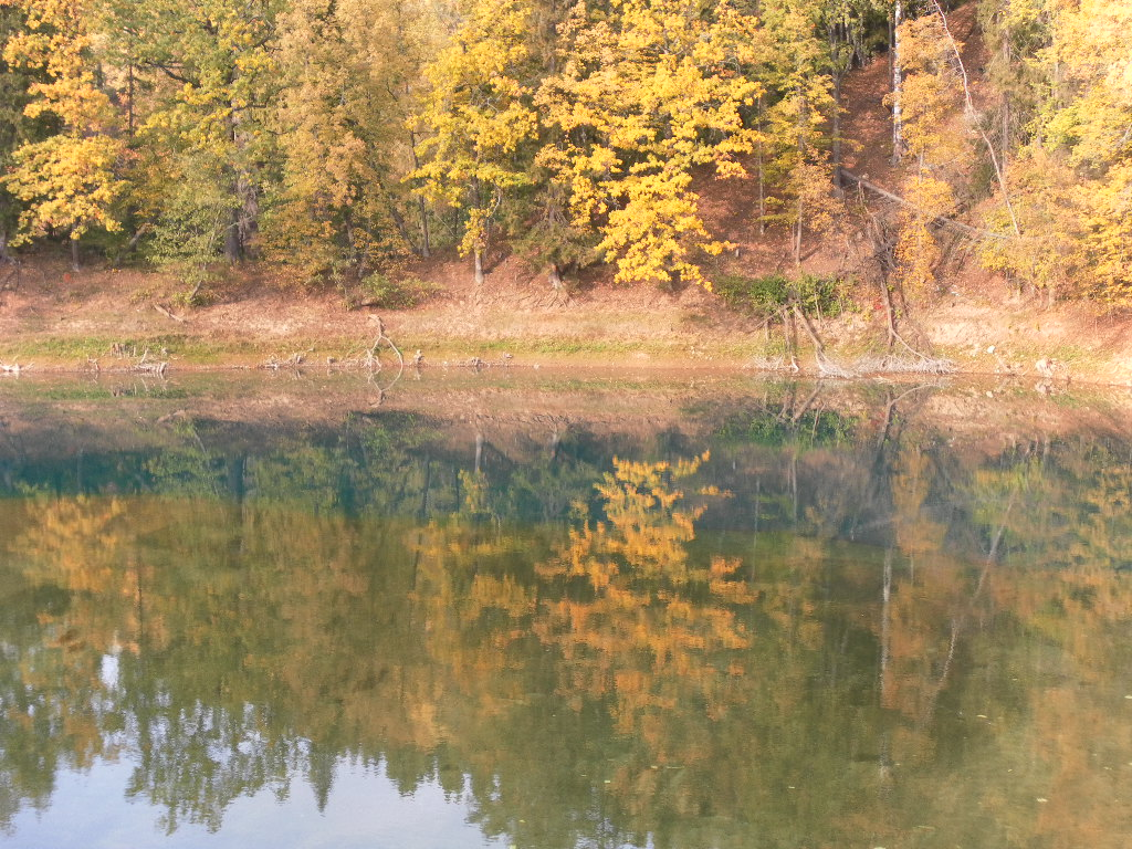 Фотография родника с плотины Красноключёвской МГЭС